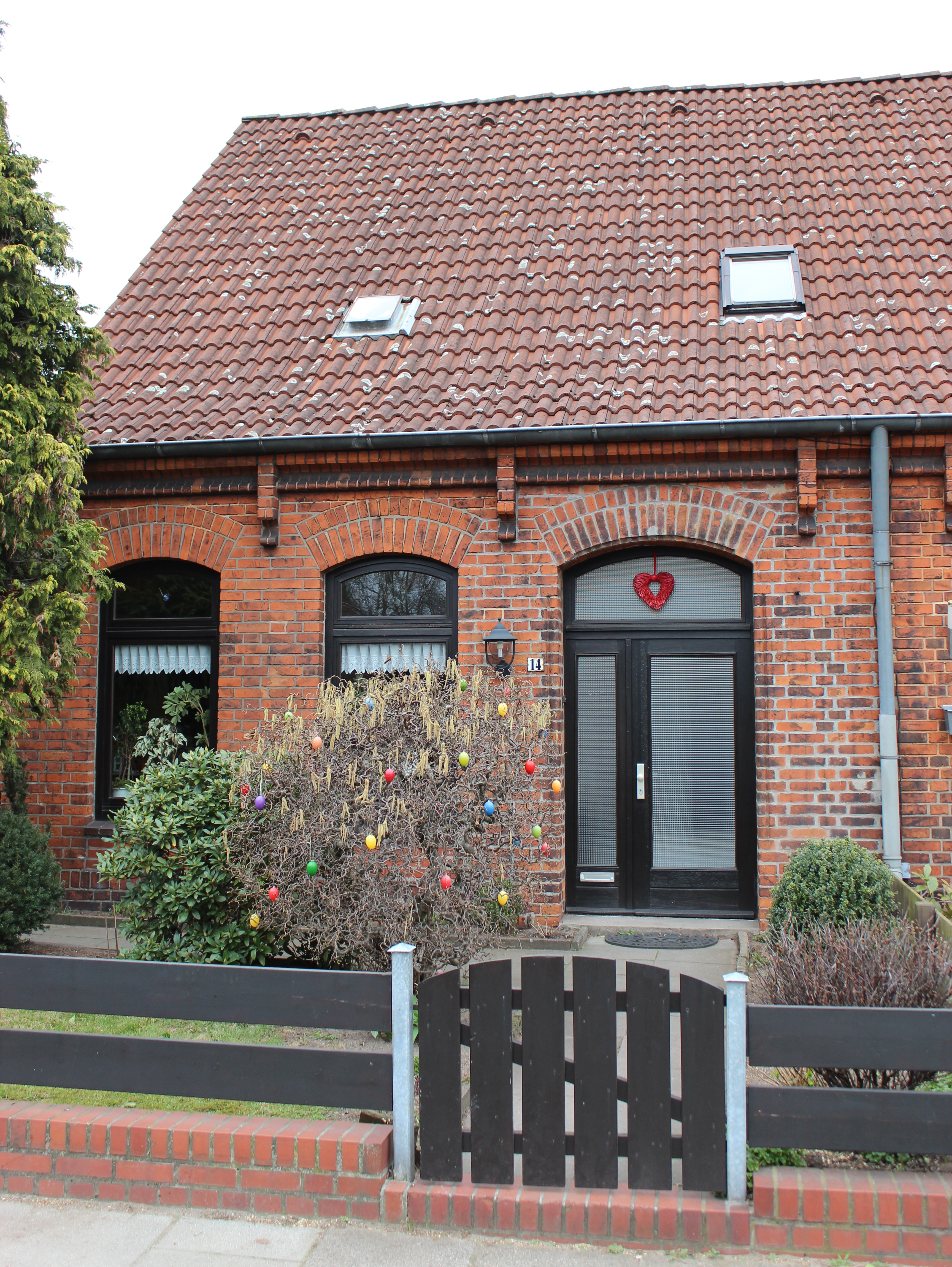 Strafanstalt Oslebshausen, Beamtenwohnhaus in Bremen, Am Kammerberg 14. Das abgebildete Objekt ist ein geschütztes Kulturdenkmal in der Freien Hansestadt Bremen, mit der Nr. 1358 beim Landesamt für Denkmalpflege registriert.